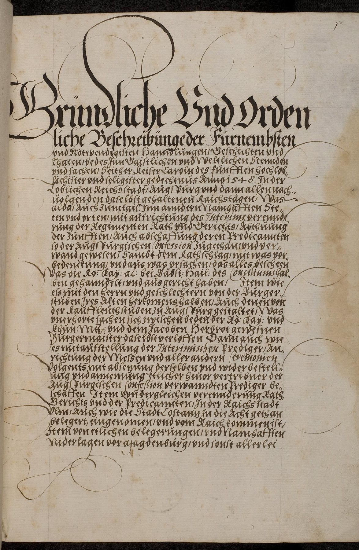 Codex Palatinus germanicus 100, "[Paul Hector Mair:] Augsburger Chronik", Blatt 1br der Handschrift (Titelblatt, Vorderseite).